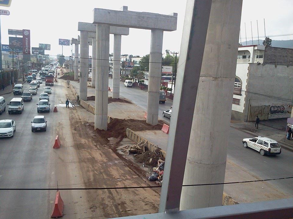 hace referencia a la inversión en proyectos que beneficien a la sociedad. tasa social de descuento